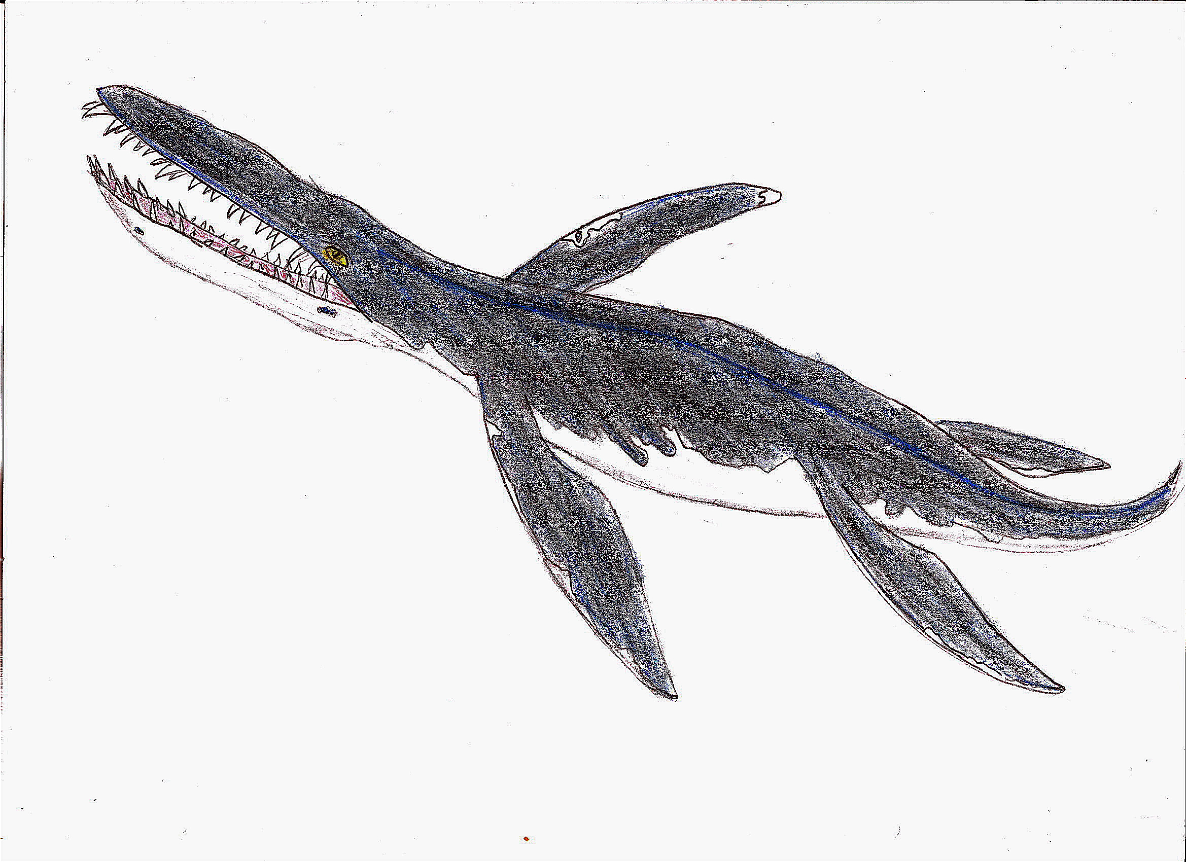 Liopleurodon ferox